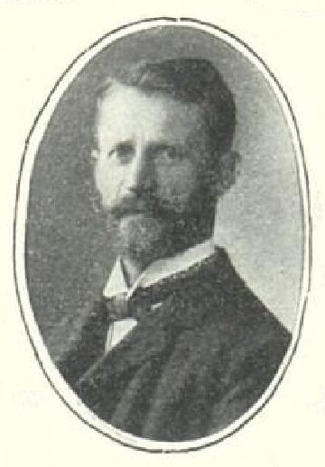 Tomáš Mazanec (1858-1946), rakouský politik české národnosti